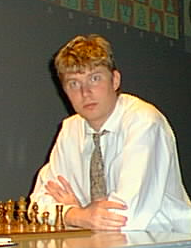 Alexej Schirow, Dortmunder Schachtage 1998.